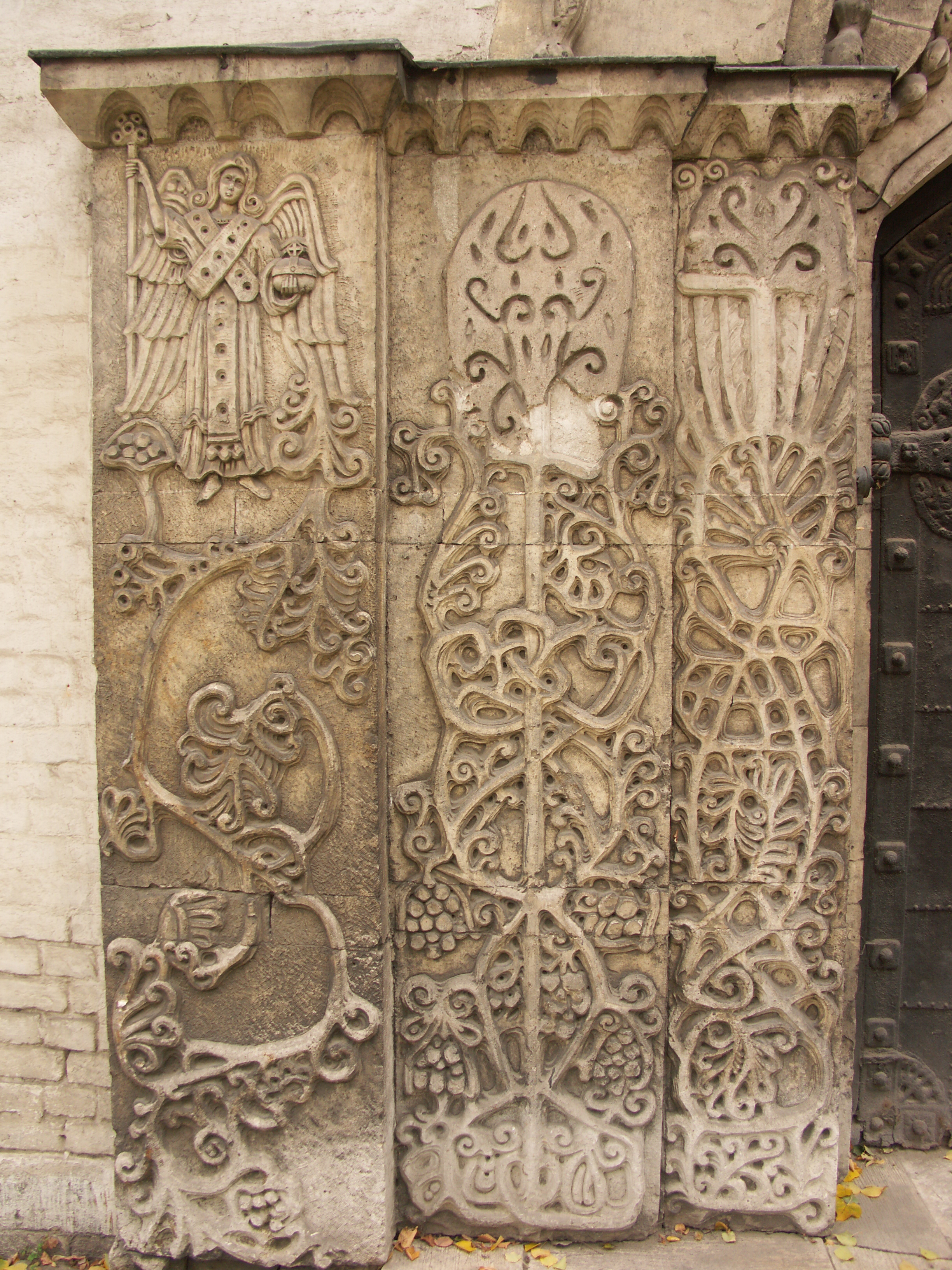 Покровский собор Марфо-Мариинской обители. Состояние в 2004 г.